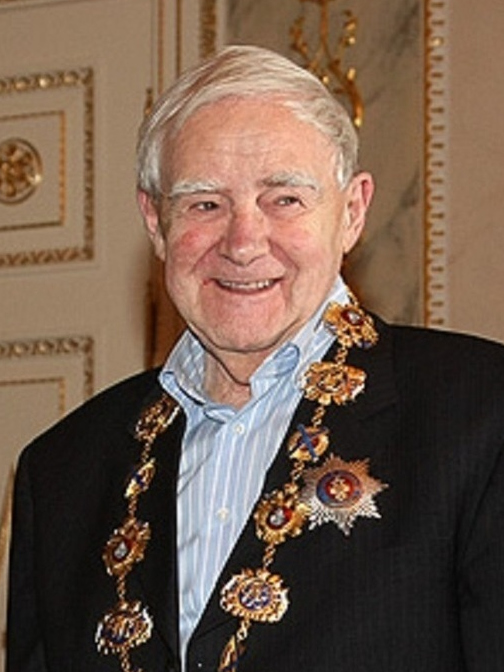 Стрельна, Константиновский дворец. Дмитрий Медведев вручил Даниилу Гранину орден Святого апостола Андрея Первозванного.